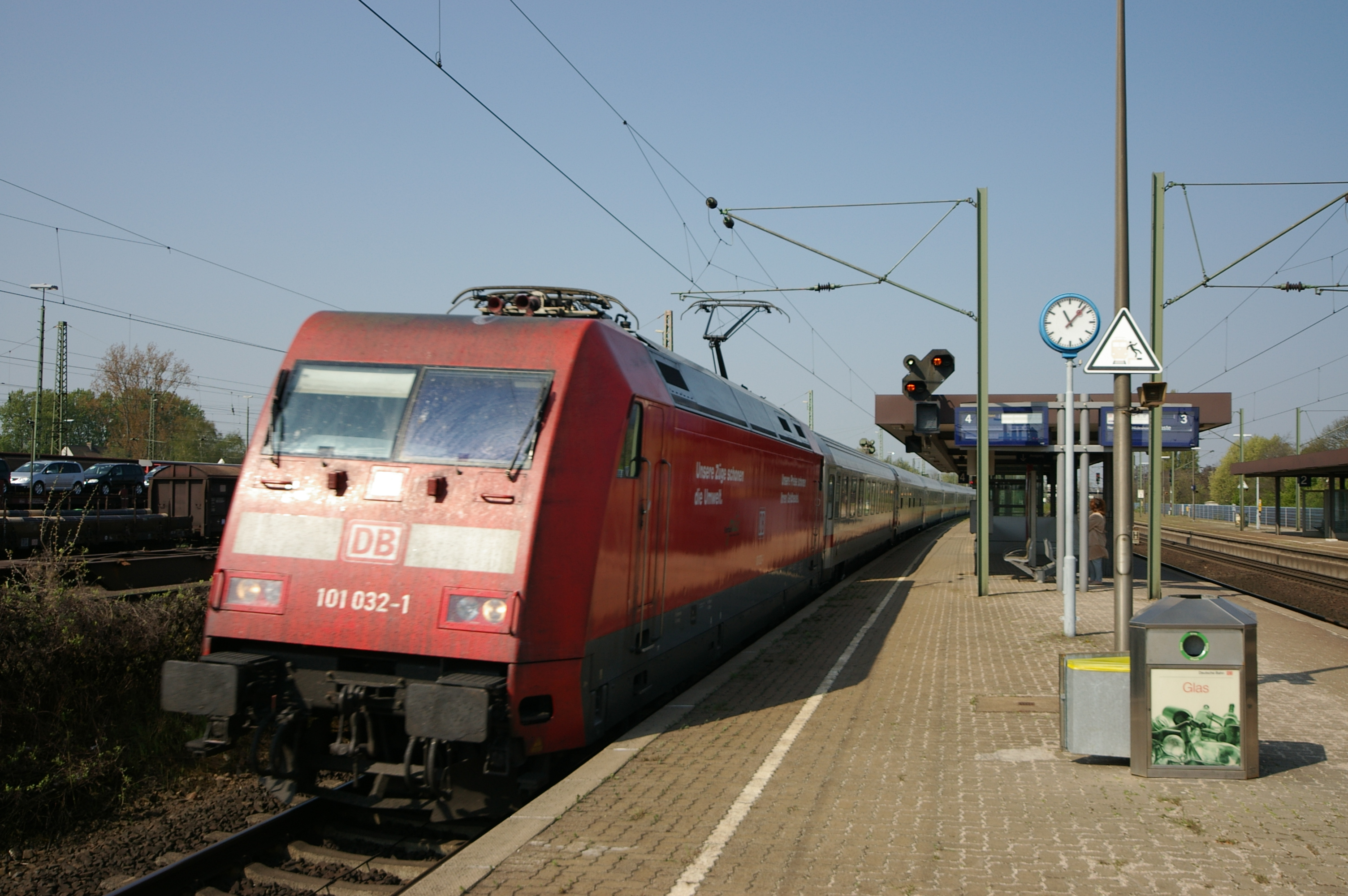 DB 101 032-1